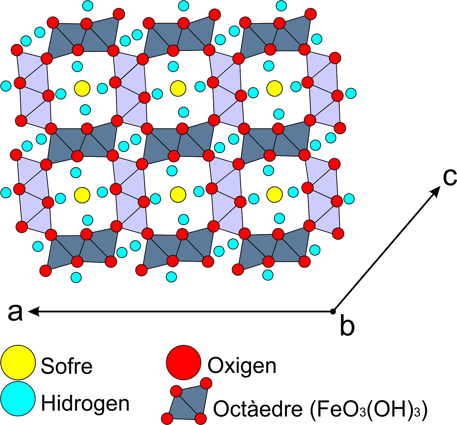 Estructura cristal·lina de la schwertmannita